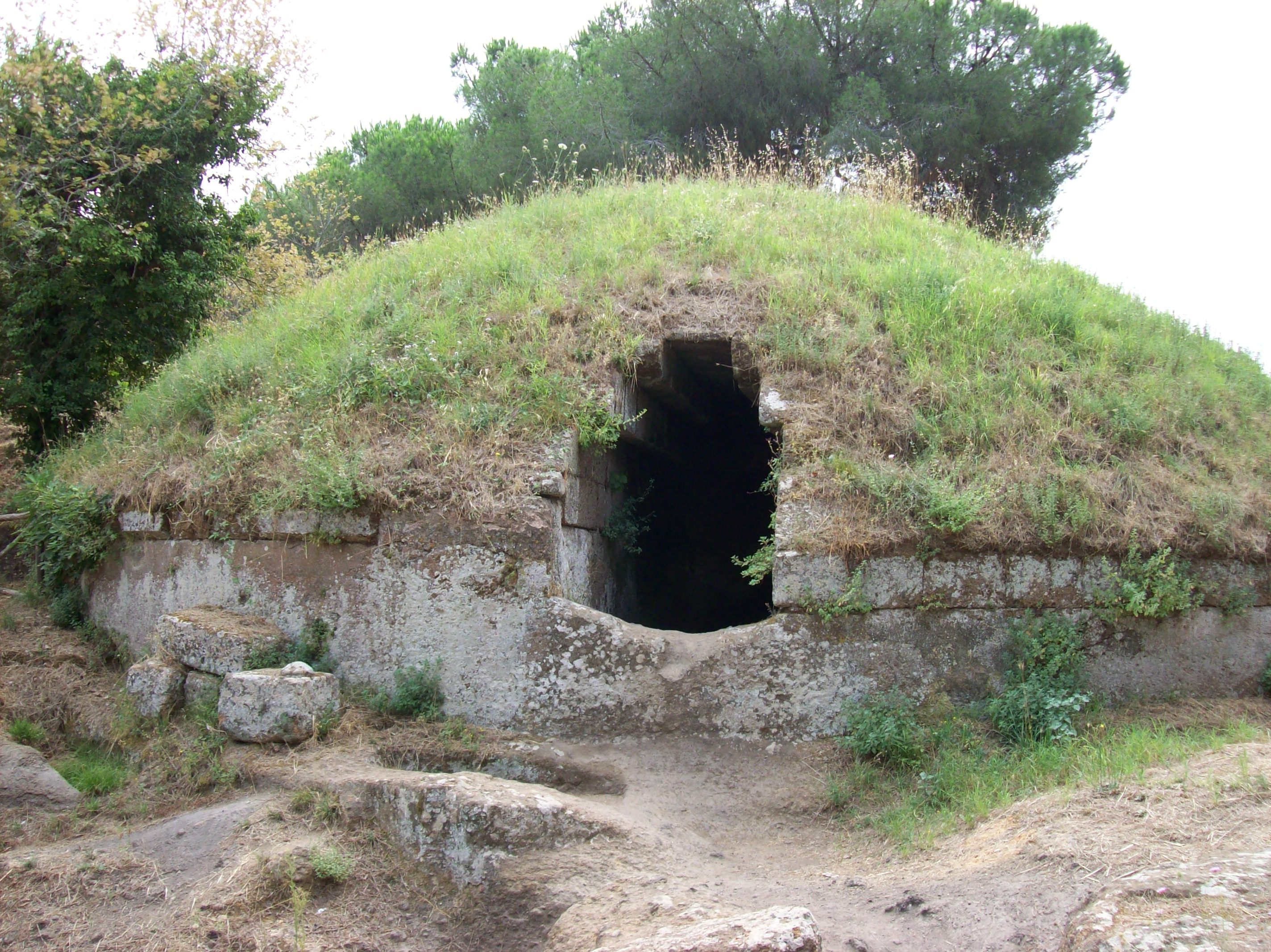 Necropoli della Banditaccia di Cerveteri (ROMA) - MIBAC. Tumulo This is a photo of a monument which is part of cultural heritage of Italy.